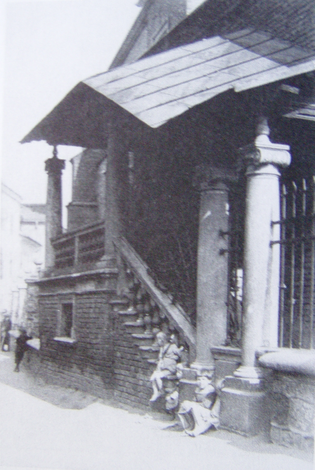 Loggia na zachodniej elewacji Starej Synagogi w Krakowie